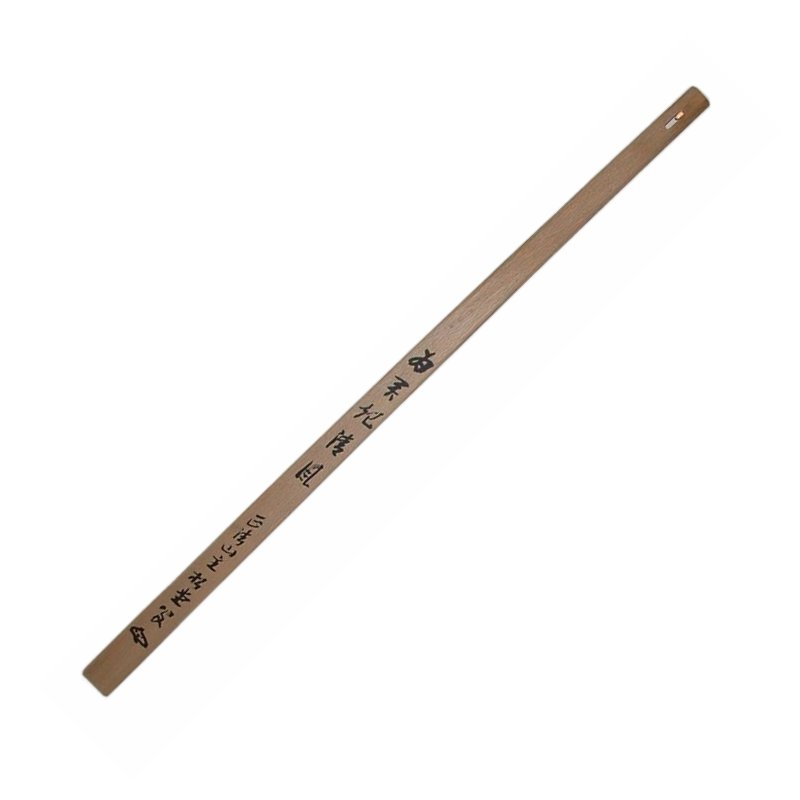 Keisaku Photograh by Gakuro